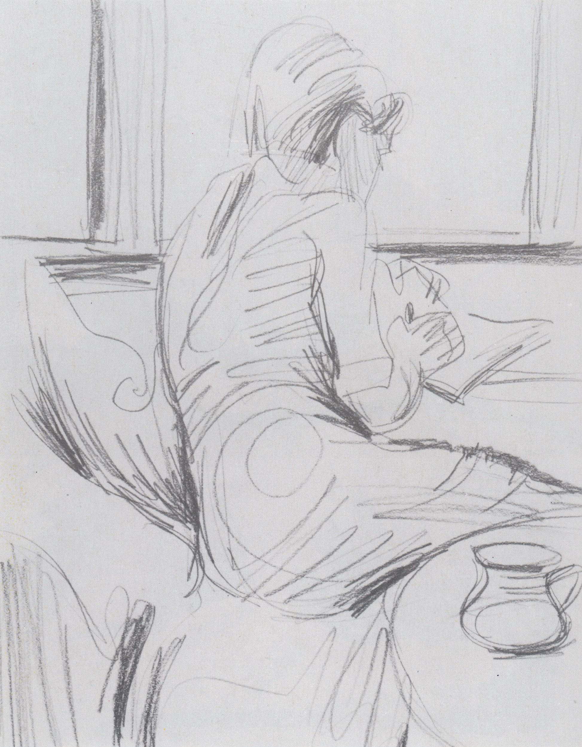 Klaus Andreas Moering, Schreibende, Zeichnung, 1939